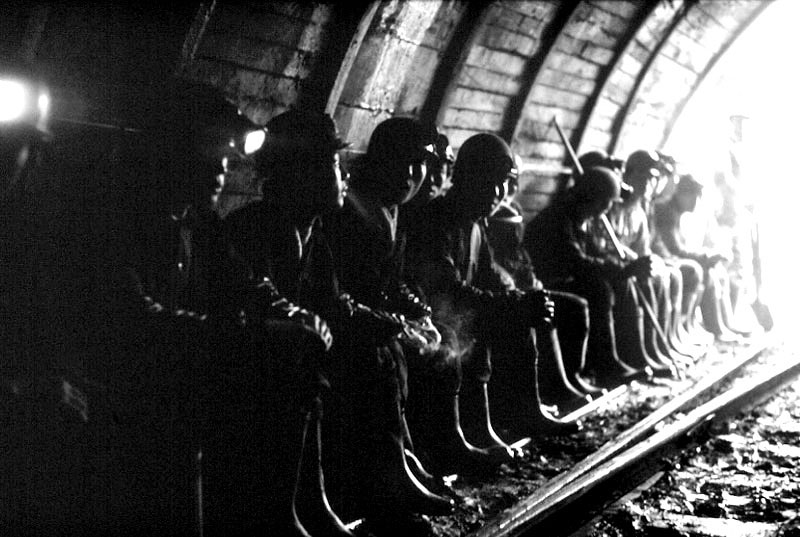 촬영일 : 1976년 07월 12일 촬영장소 : 대한민국 강원 탄광지대 참석자 : 탄광대원 인물상세정보 : 탄광대원(전체)